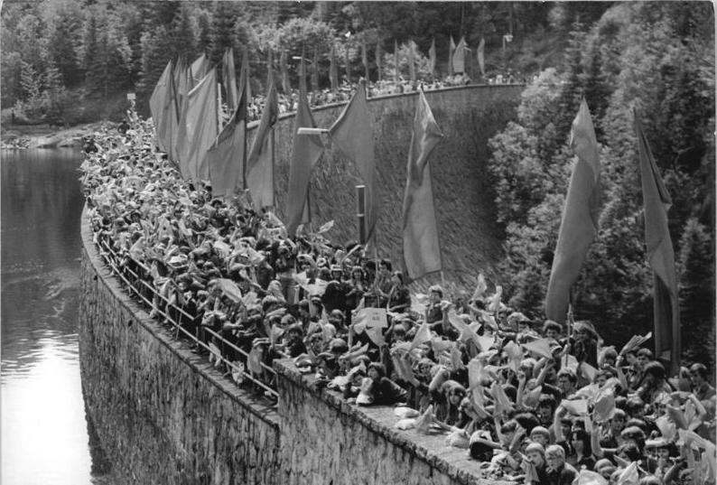 ADn-ZB-Thieme -8.6.1981-mr-Karl-Marx-Stadt: 3000 Jugendliche trafen sich bei Sosa zu einer Manifestation anläßlich des 30. Jahrestages der Fertigstellung der Talsperre des Friedens. Sie war die erste zentrale Jugendobjekt der FDJ. Während des Verbandstreffen der FDJ bekräftigten die Jung- und Erstwähler ihr "Ja" zur Friedenspolitik der DDR und zu den Kandidaten der Nationalen Front für die Wahlen am 14. Juni. "